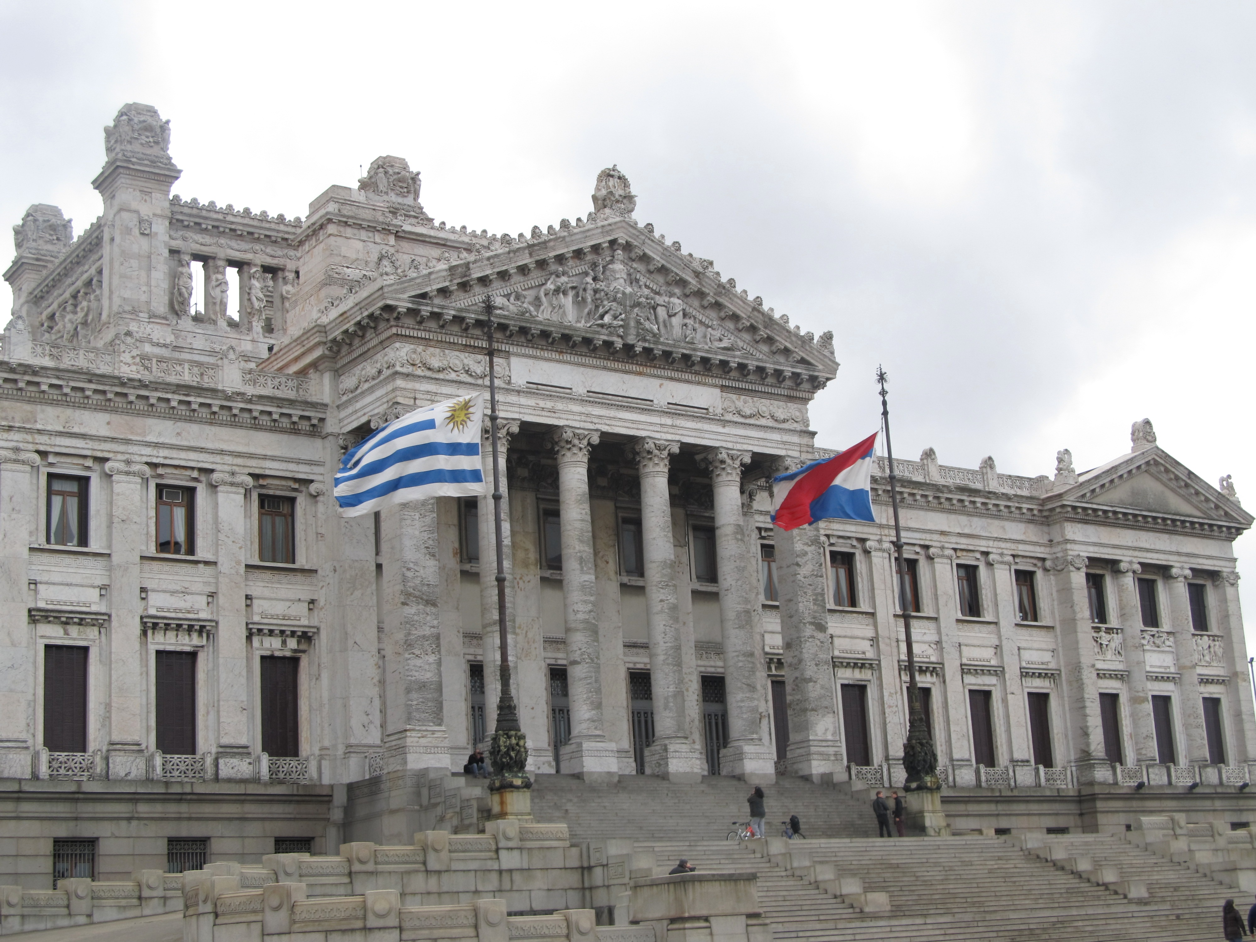 Palacio Legislativo. Ubicada en el departamento de Montevideo